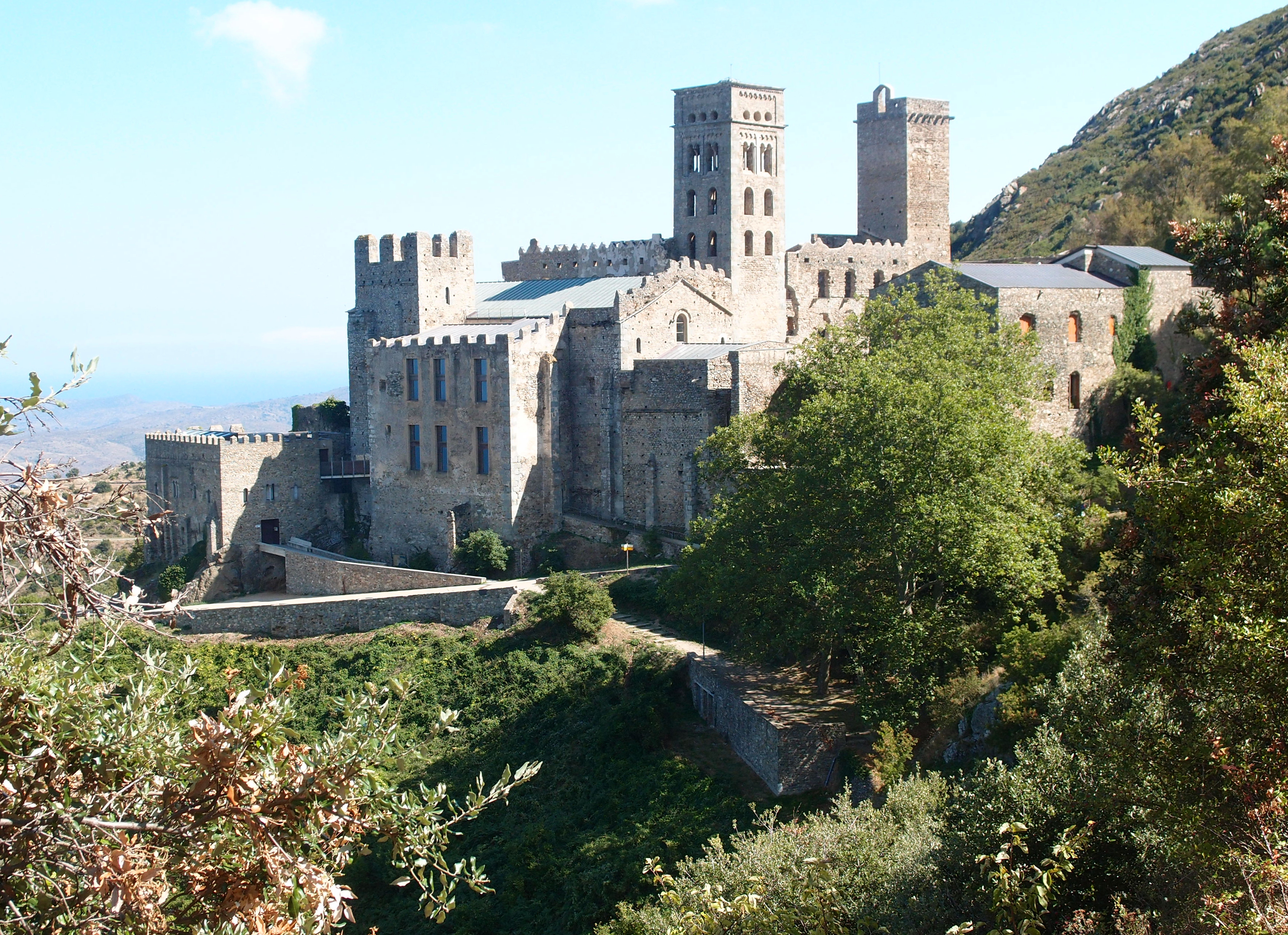 Kloster Sant Pere de Rodes (Alt Emporda / Katalonien) Datum: 14.09.2013 Urheber: M. Pfeiffer alias Benutzer:Gordito1869 Quelle: privates Fotoarchiv des Urhebers